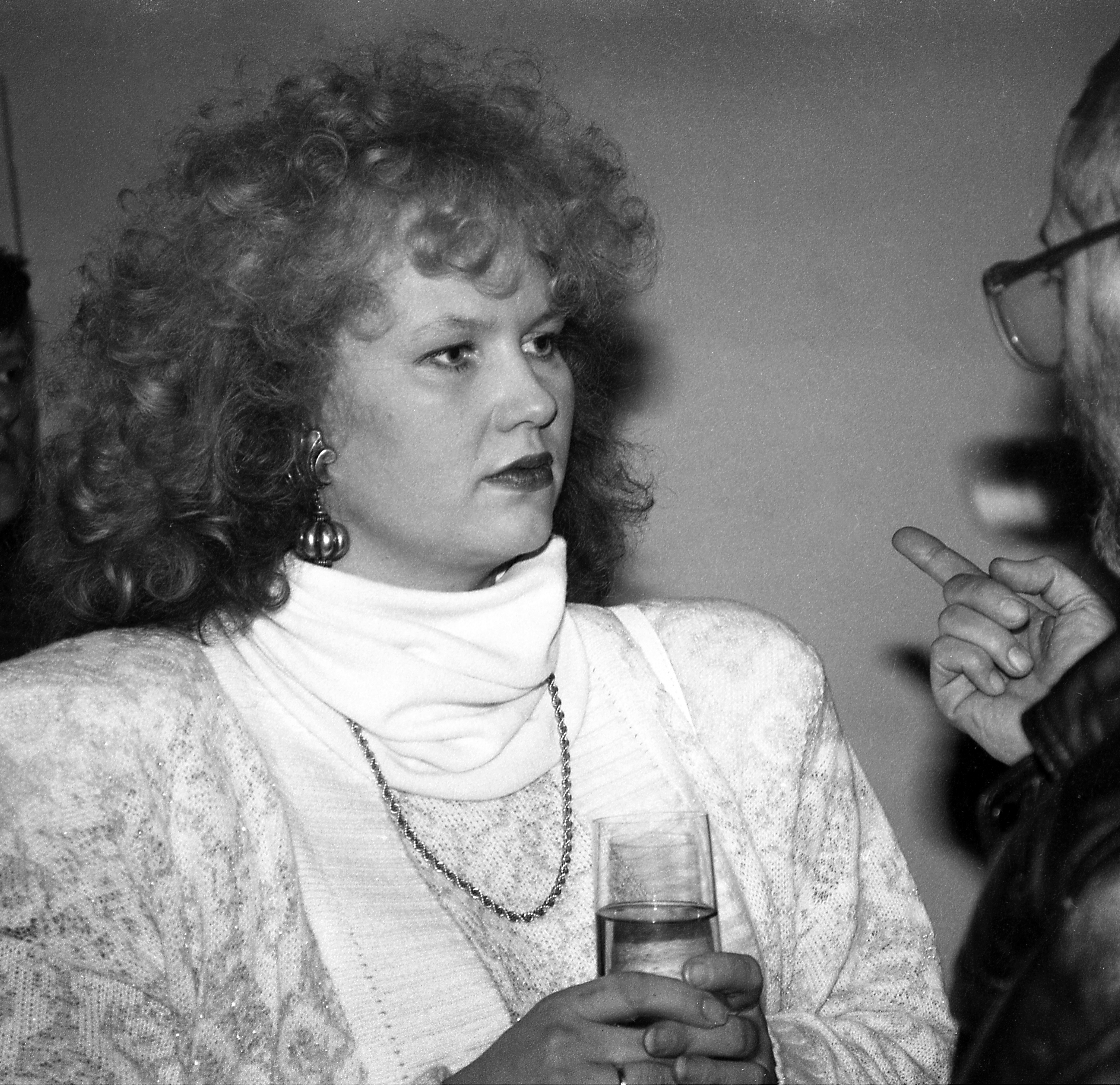 Enelin Meiusi